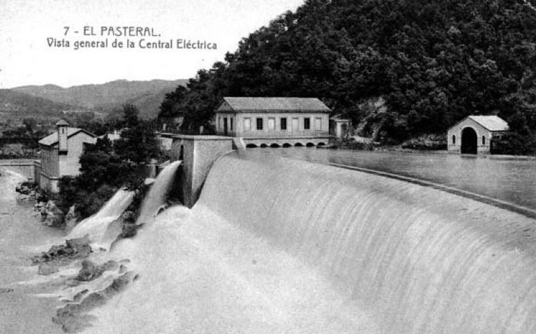 Resclosa del Pasteral al riu Ter. Foto de l'època en que es va crear per part de l'empresa tèxtil d'Anglès "Burés i Salvadó", el 1903-1905